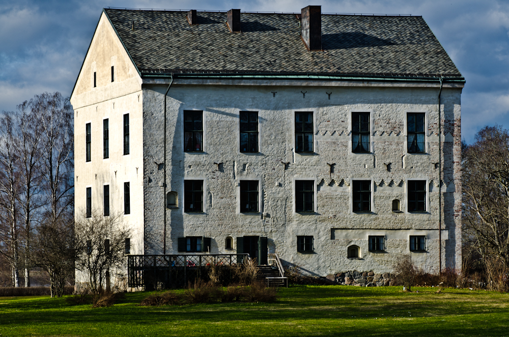 Göksholms slott